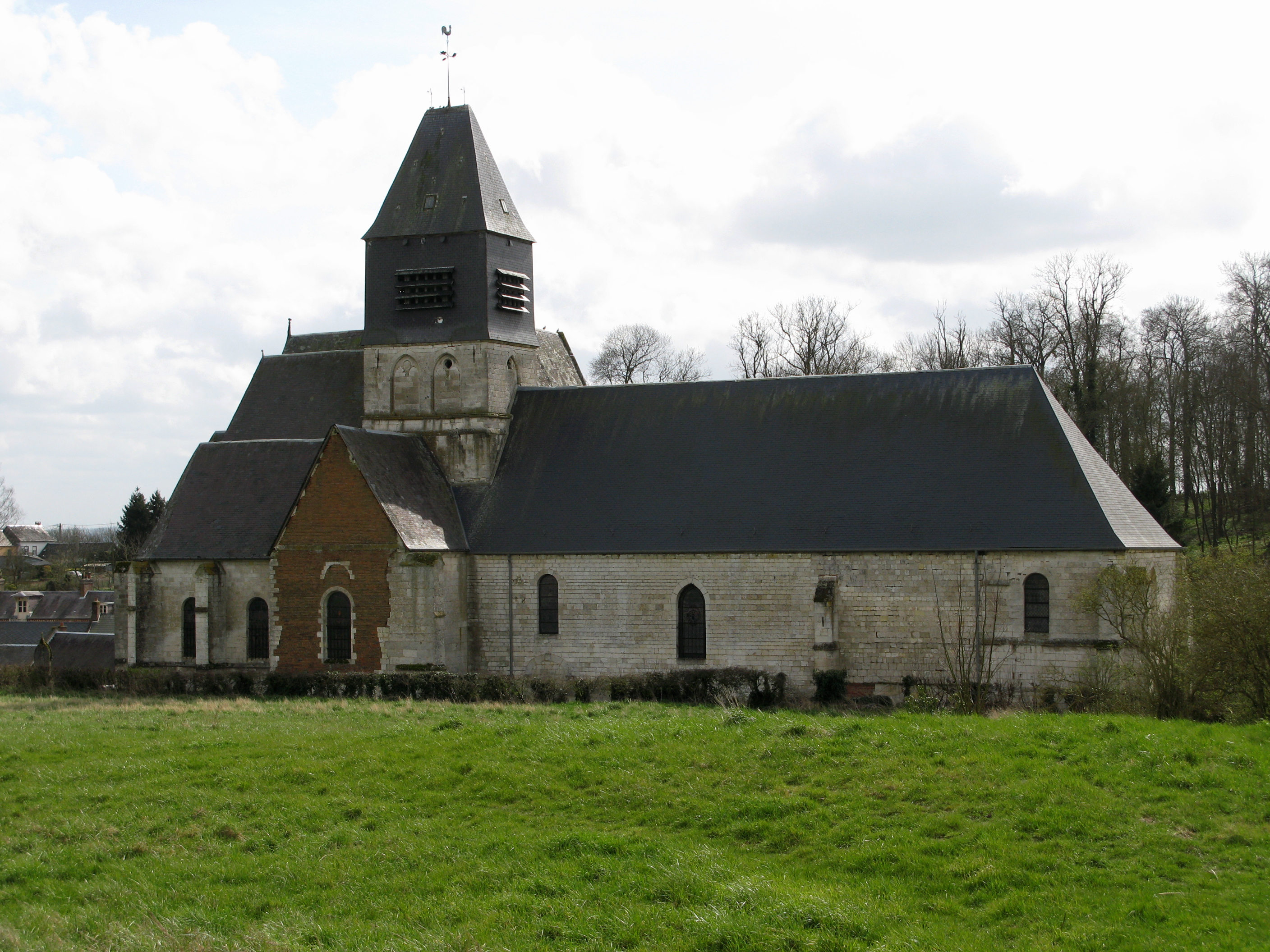 Bonneuil-les-Eaux (Oise, France) - L'église, vue du côté opposé à la motte féodale. . . .